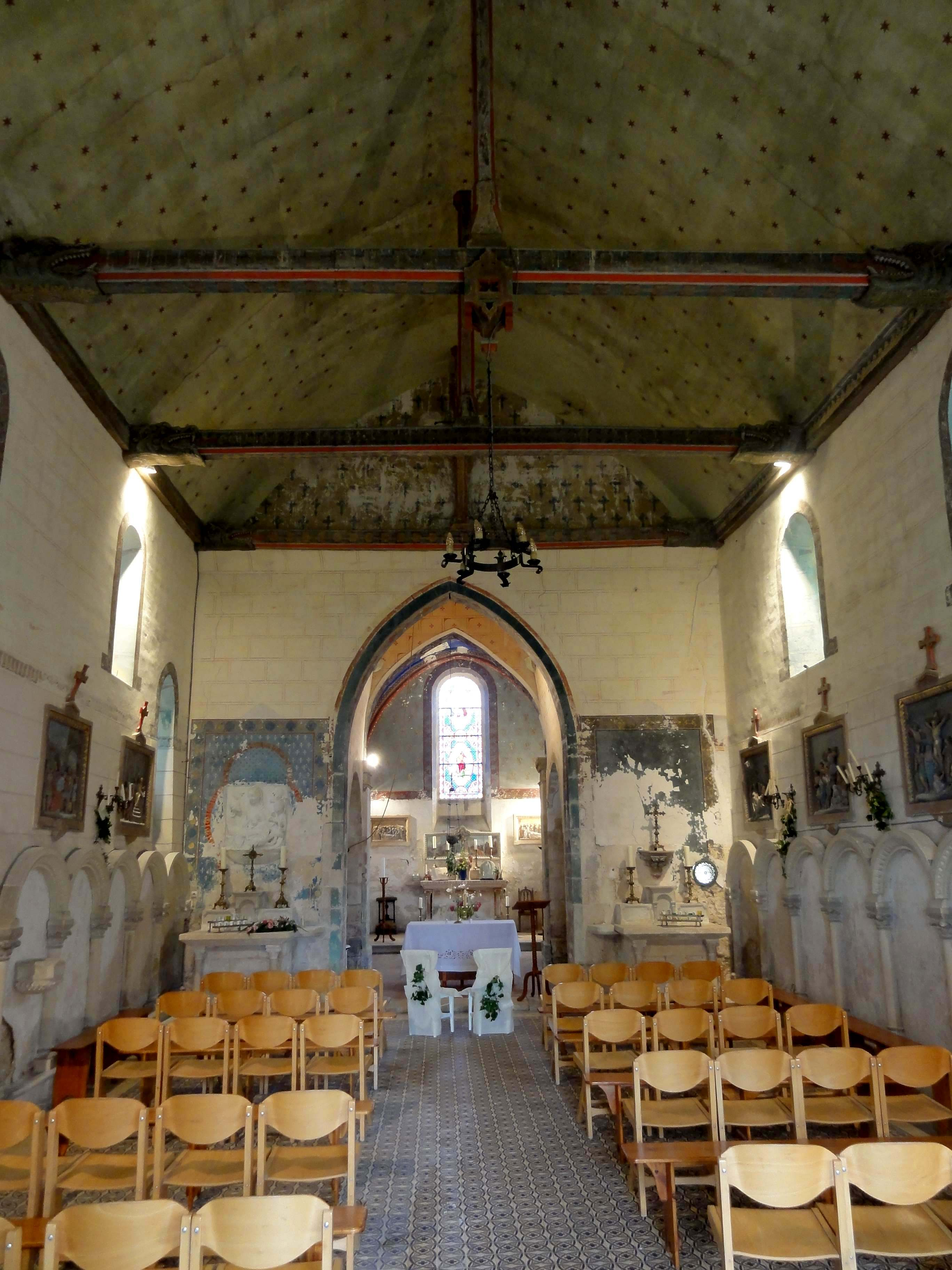 Intérieur de la chapelle - voir titre.